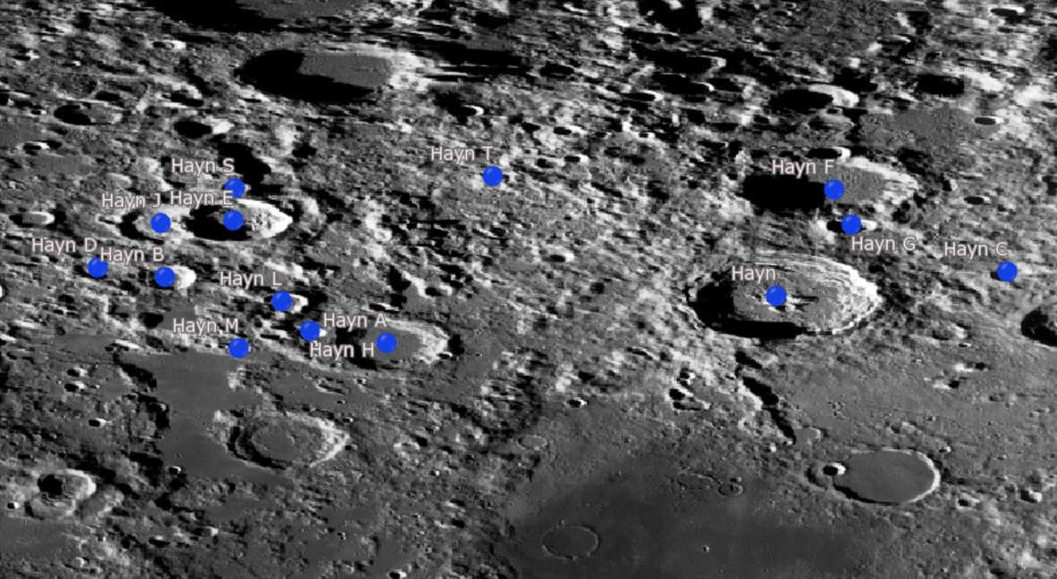 Crater lunar Hayn. Cráteres satélite. (Imagen LRO)